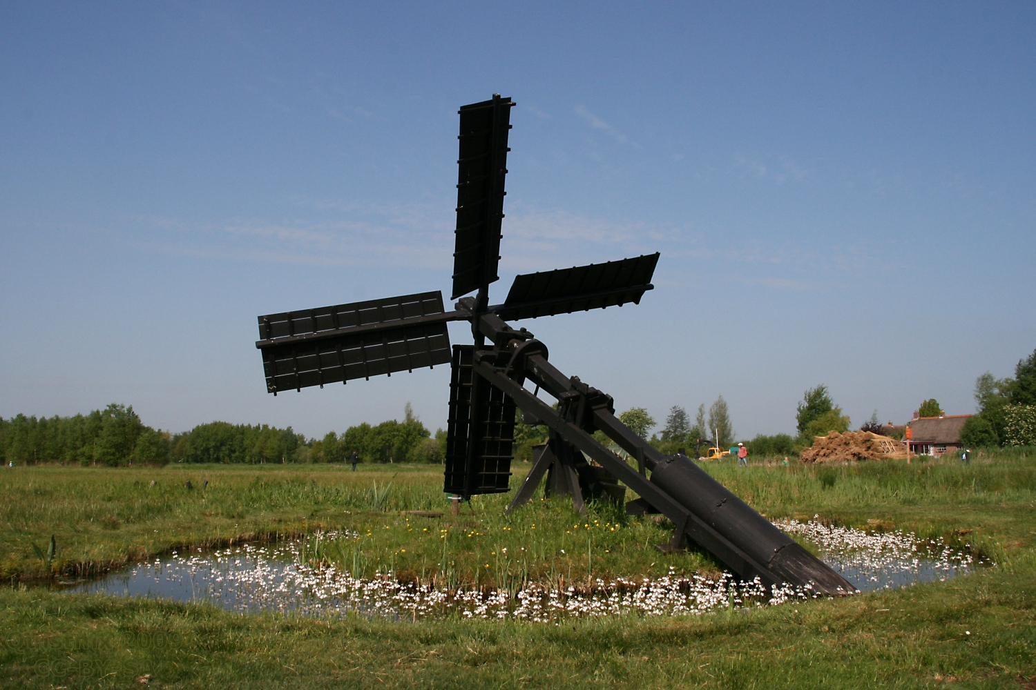 Ossenzijl: Tjasker in natuurpark De Weerribben